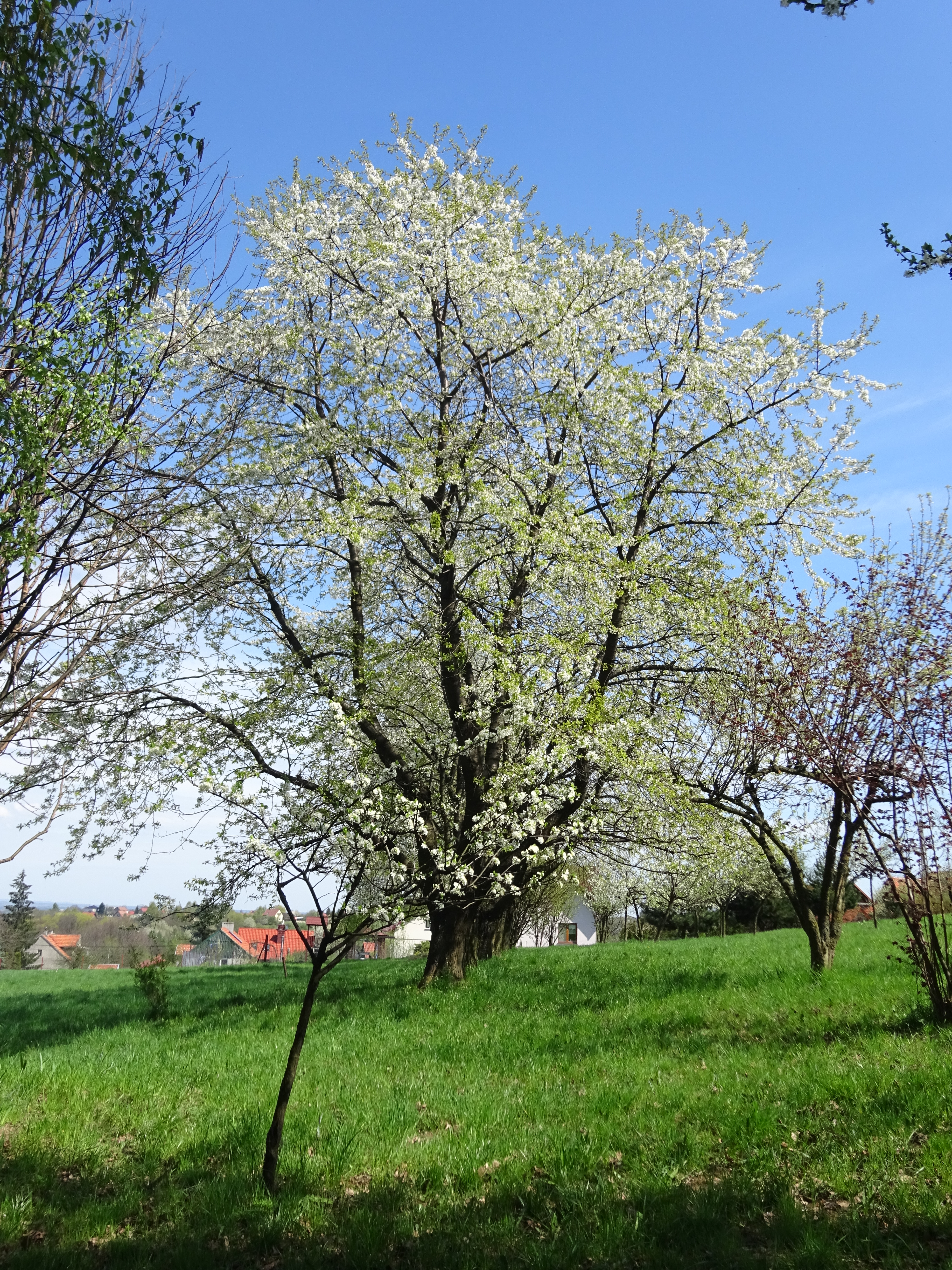 Kwitnąca Czereśnia wiosną na Lednicy Górnej koło Krakowa. 2016